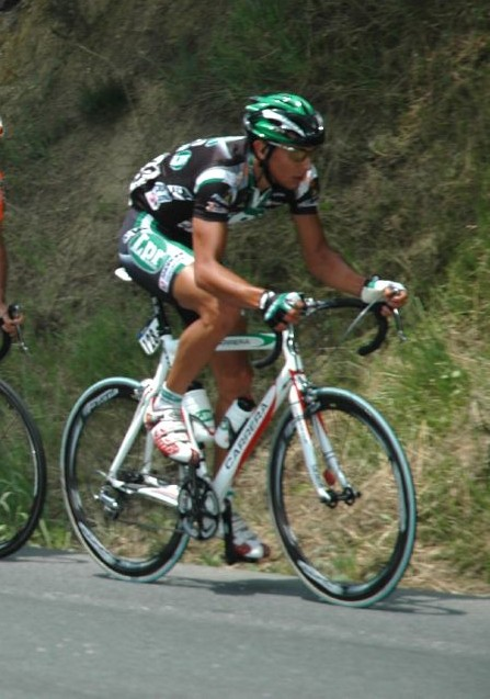 Roberto Traficante, Euskal Bizikleta 2007